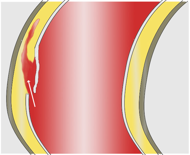 aortic dissection - Aortendissektion Scheme